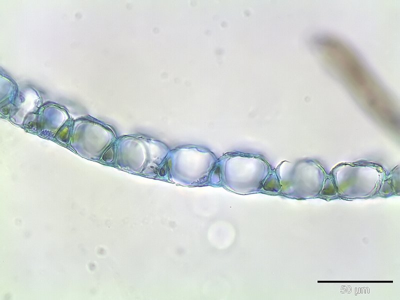 Ufer-Torfmoos (Sphagnum riparium), Astblatt-Querschnitt, Vergrößerung: 400x